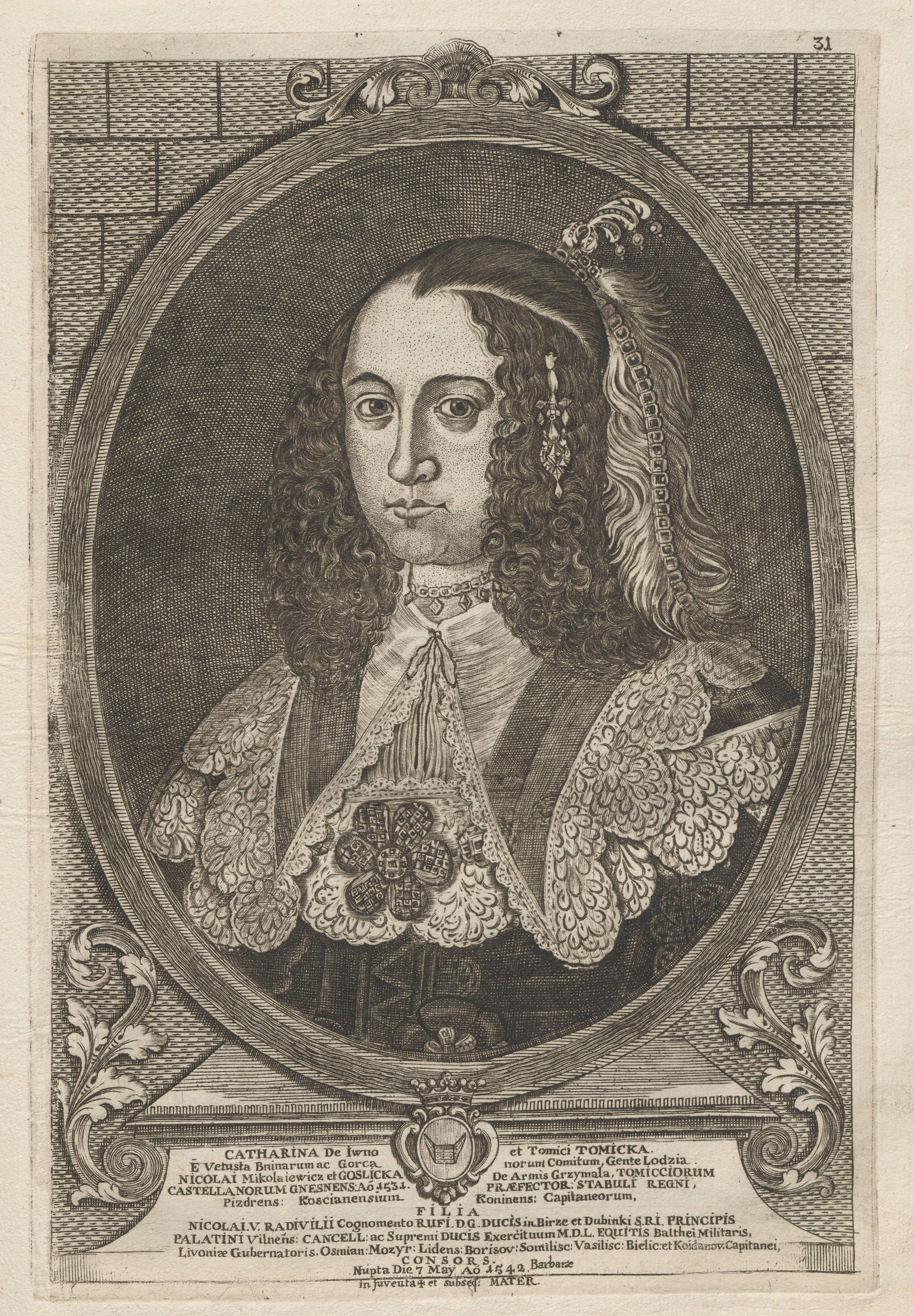 Беларуская (тарашкевіца): Партрэт Кацярыны Радзівіл (Kaciaryna Radzivił) з роду Таміцкіх